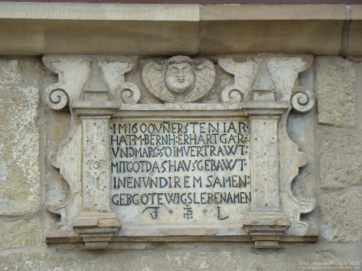 Portalinschrift um 1600 in Kleingartach (Eppingen)